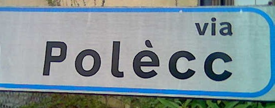 Esempio di toponomastica in dialetto bergamasco